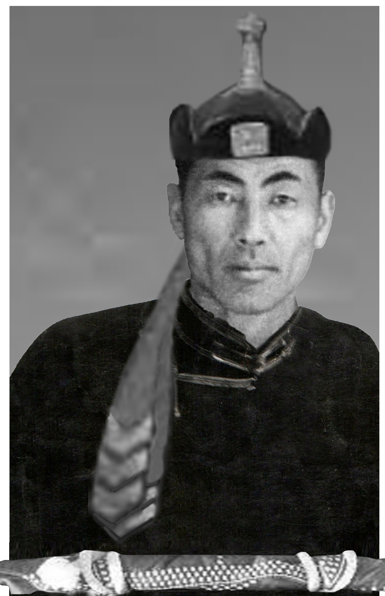 Монгол: Архангай аймгийн Аймгийн Хурц, Бадрангуй арслан